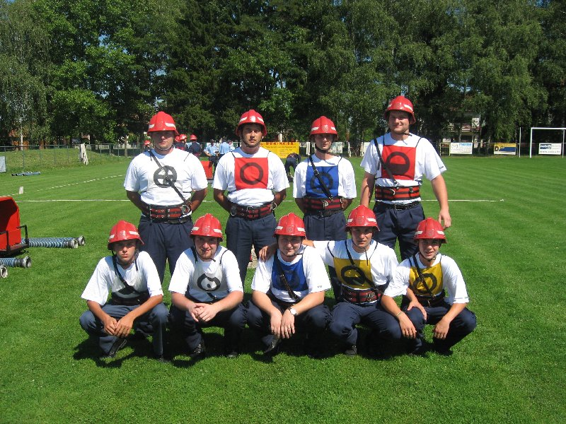 Vatrogasci DVD-a Mraclin na natjecanju.